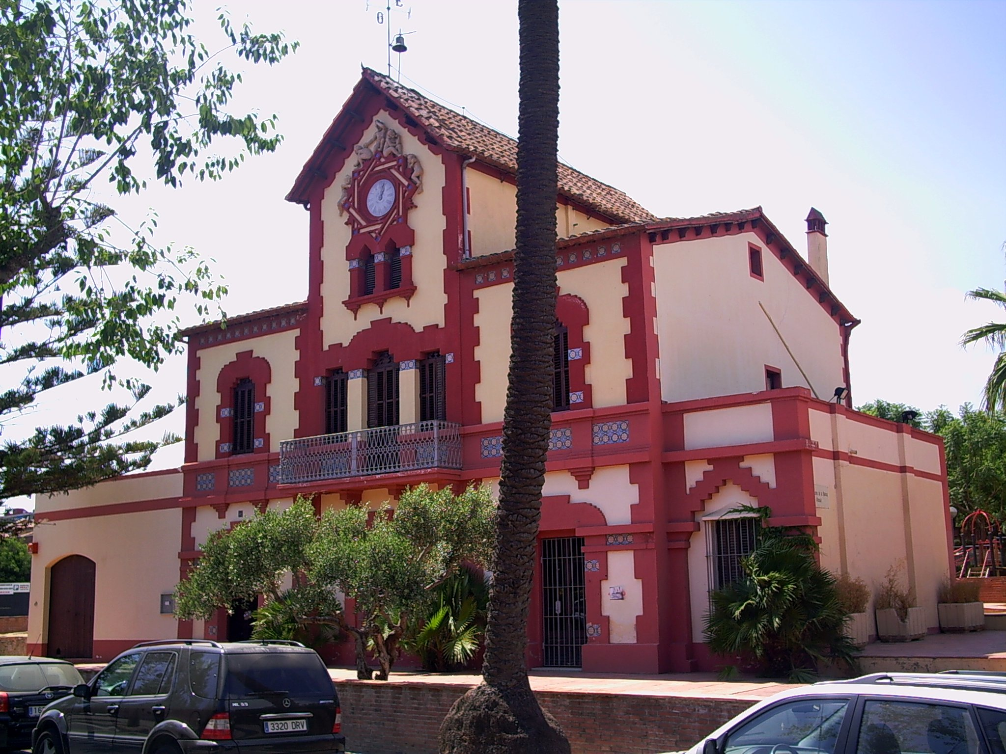 La Sènia del Rellotge, Ca l'Aldrufeu, construït per Eduard Ferrés i Puig, l'any 1902, seu del Museu de la Marina Vilassar de Mar, comarca del Maresme, Catalunya.